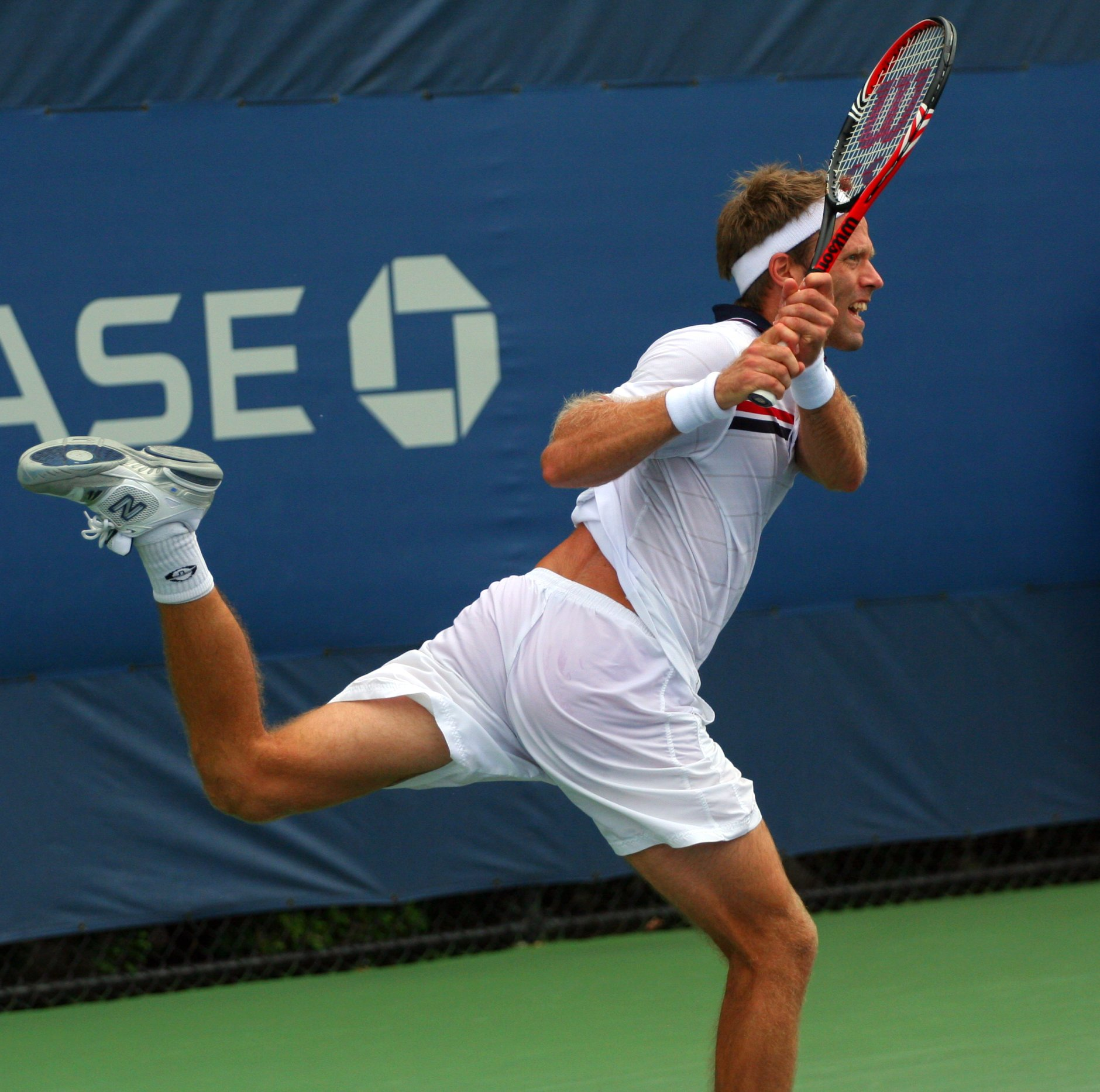 U.S. Open Sept. 3, 2010